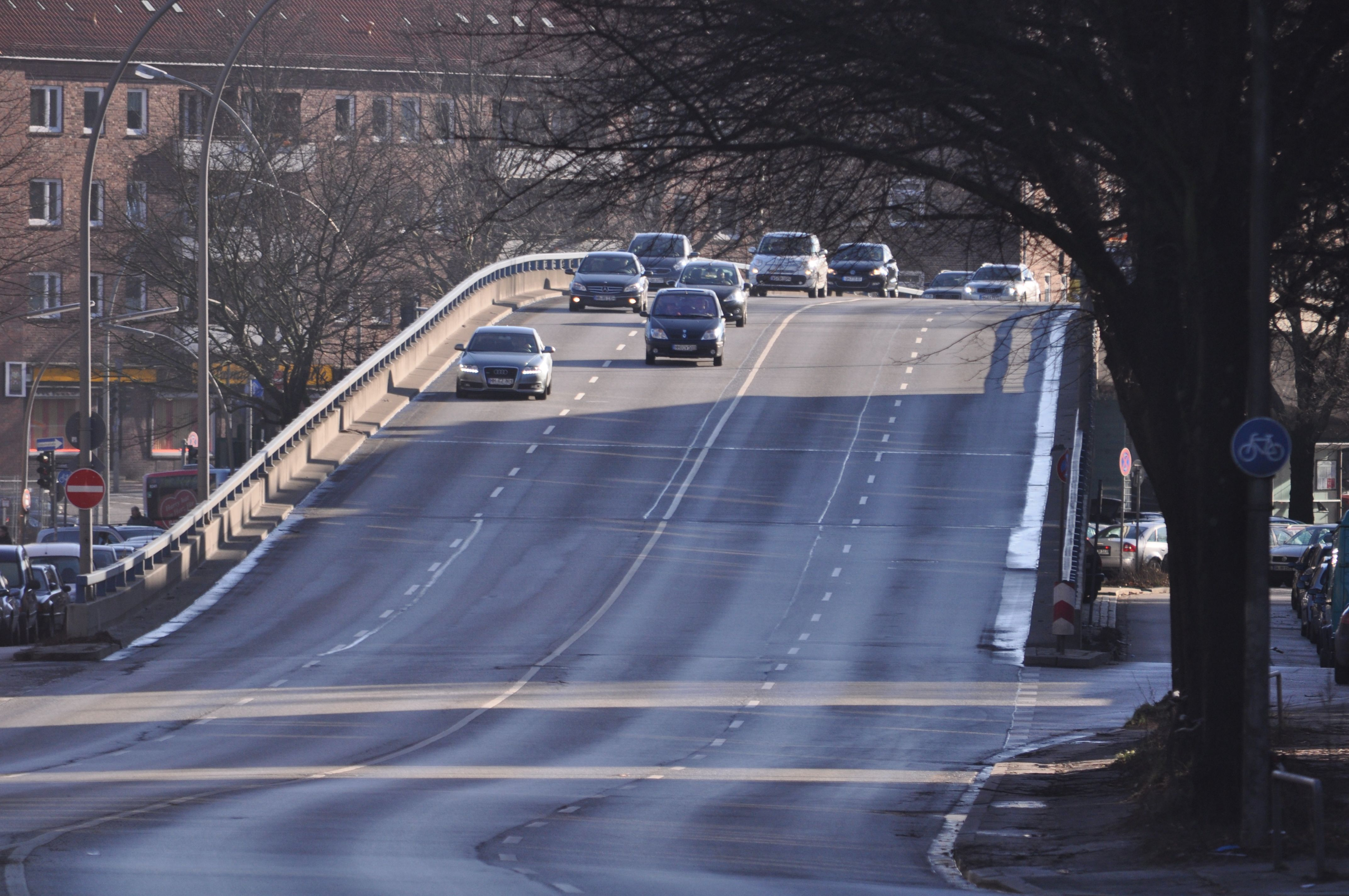 Barmbeker-Ring-Brücke in Hamburg-Barmbek-Nord, vom Rübenkamp gesehen.